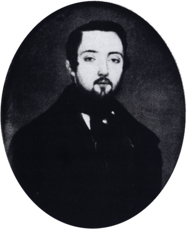 Antollín Faraldo